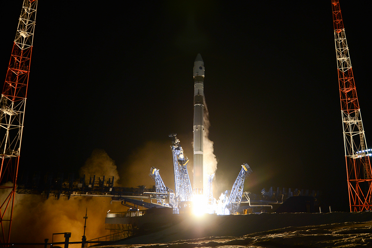 Пуск ракеты-носителя «Союз-2.1в» с военным спутником на борту с космодрома Плесецк